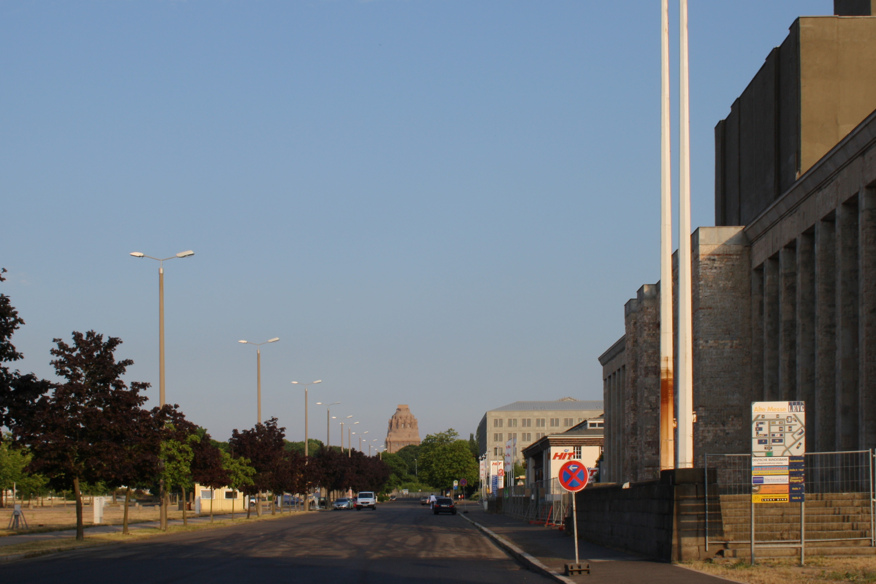 Freifläche des alten Leipziger Messegelände mit Blick auf Achilleion, Einkaufsmarkt, Bundesbankgebäude und Völkerschlachtdenkmal.